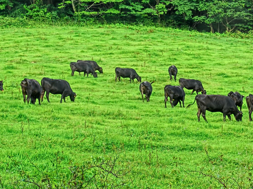 三瓶山の裾野での放牧